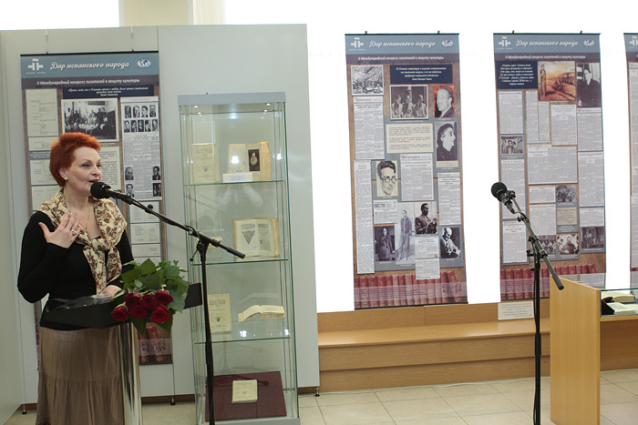 Директор выставочного Центра ВГБИЛ им. М.И. Рудомино Татьяна Феоктистова открытвает выставку "Дар испанского народа" 21 апреля 2011 года